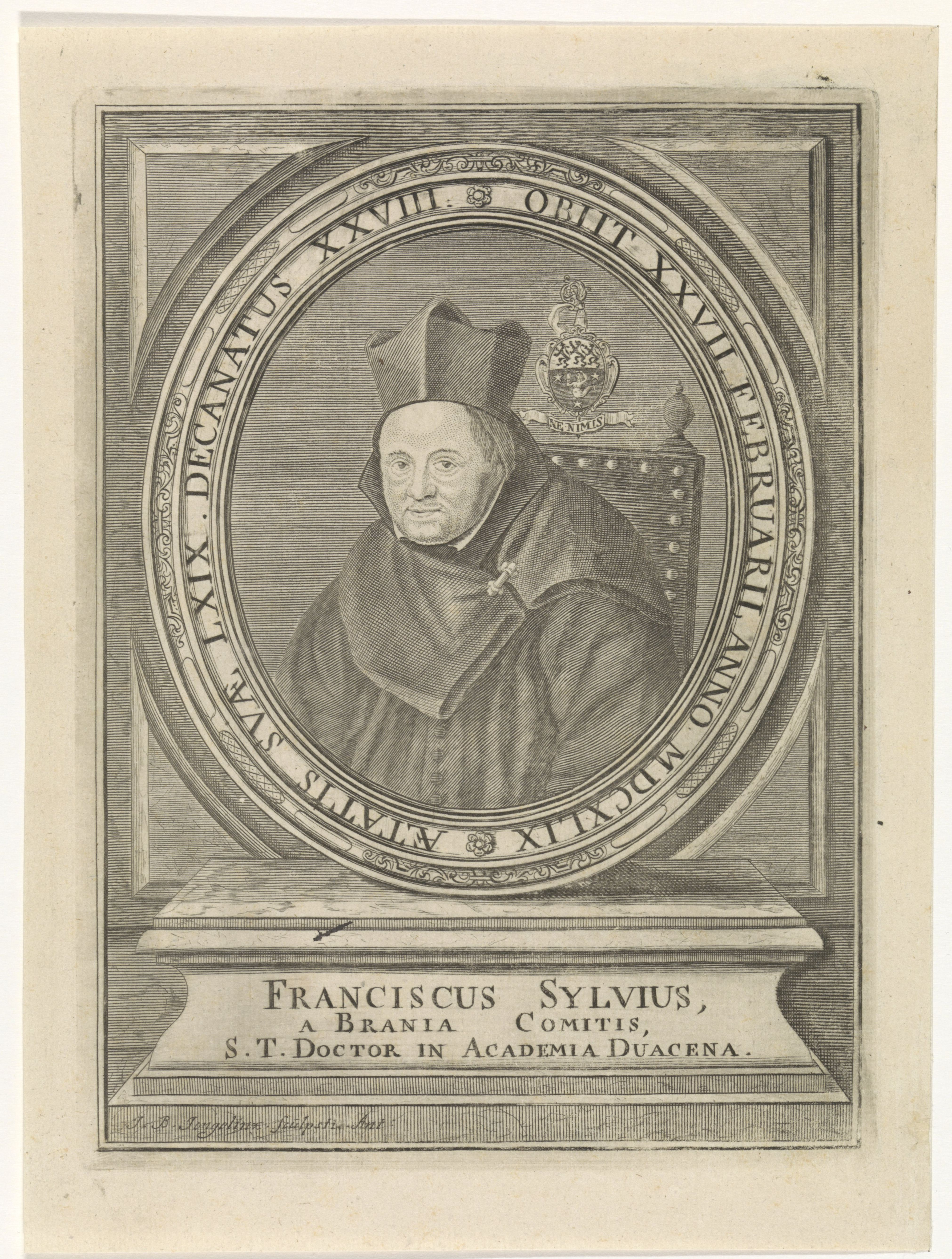 IdentificatieTitel(s): Portret van Franciscus SylviusObjecttype: prent boekillustratie Objectnummer: RP-P-OB-47.857Catalogusreferentie: Van Someren 5462Opschriften / Merken: verzamelaarsmerk, verso, gestempeld: Lugt 2228Omschrijving: Busteportret van de theoloog en professor Franciscus Sylvius, met biretta. Hij zit op een stoel. Naast hem zijn wapenschild met een motto in het Latijn. Het portret is gevat in een ovale omlijsting met vierkant randwerk en een randschrift in het Latijn. Op de piëdestal een drieregelig onderschrift in het Latijn.VervaardigingVervaardiger: prentmaker: Jan Baptist Jongelinck (vermeld op object)Plaats vervaardiging: AntwerpenDatering: 1710 - 1725Fysieke kenmerken: ets en gravureMateriaal: papier Techniek: etsen / graveren (drukprocedé)Afmetingen: plaatrand: h 186 mm × b 137 mmToelichtingPrent gebruikt in: Johannes Franciscus Foppens, Bibliotheca belgica, sive virorum in Belgio vita, scriptisque illustrium catalogus, librorumque nomenclatura : continens scriptores (...). Brussel: Petrus Foppens, 1739.OnderwerpWie: Franciscus SylviusVerwerving en rechtenVerwerving: onbekendCopyright: Publiek domein